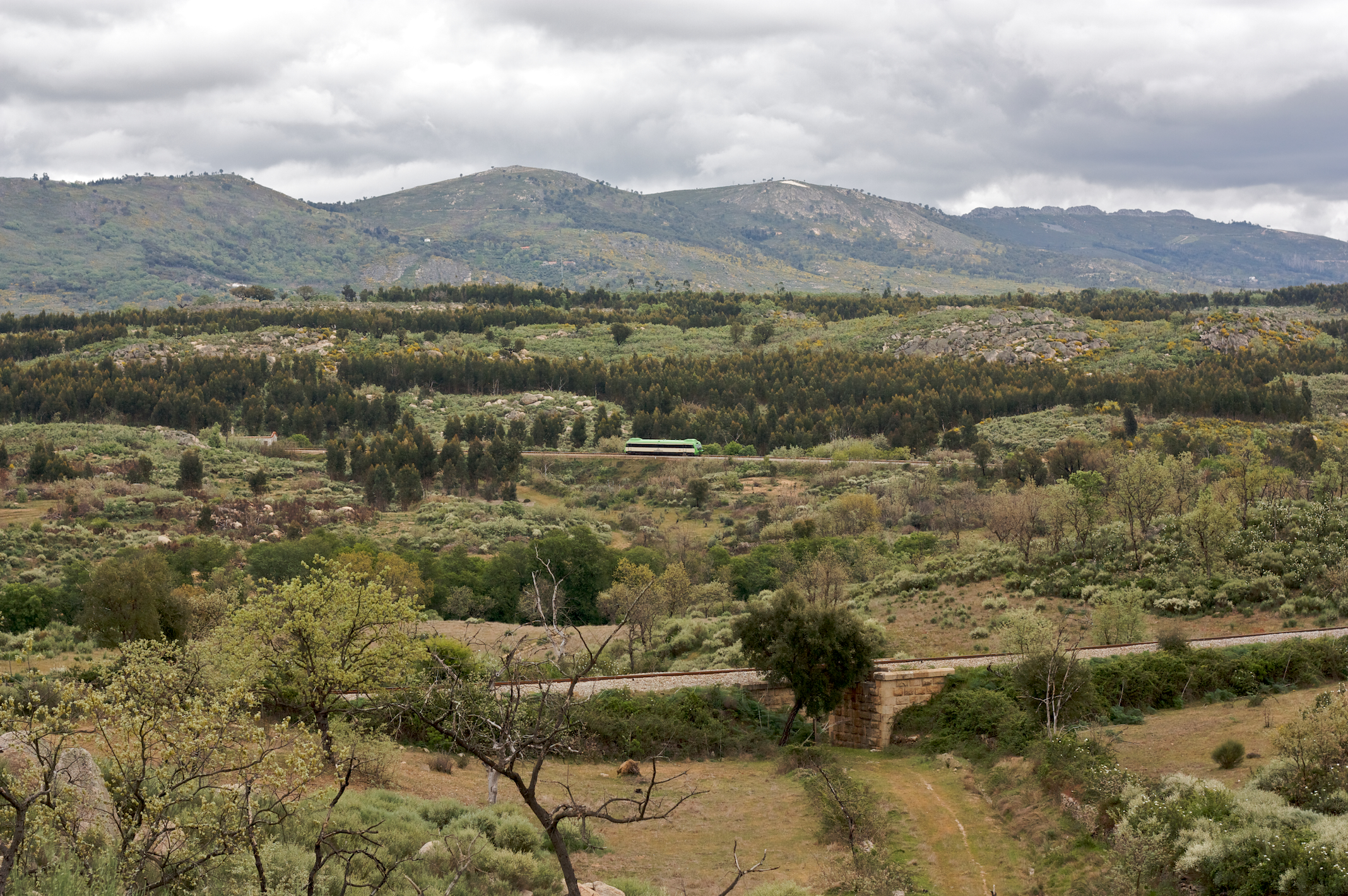 Tipo: Comboio Regional 5552 [Marvão • Beirã - Torre das Vargens] Local: Castelo de Vide [Ramal de Cáceres, PK 218] Data e hora: 13 de Abril de 2009 [15h22] Material: Automotora 0355 [Unidade Simples Diesel - Allan Renovada]